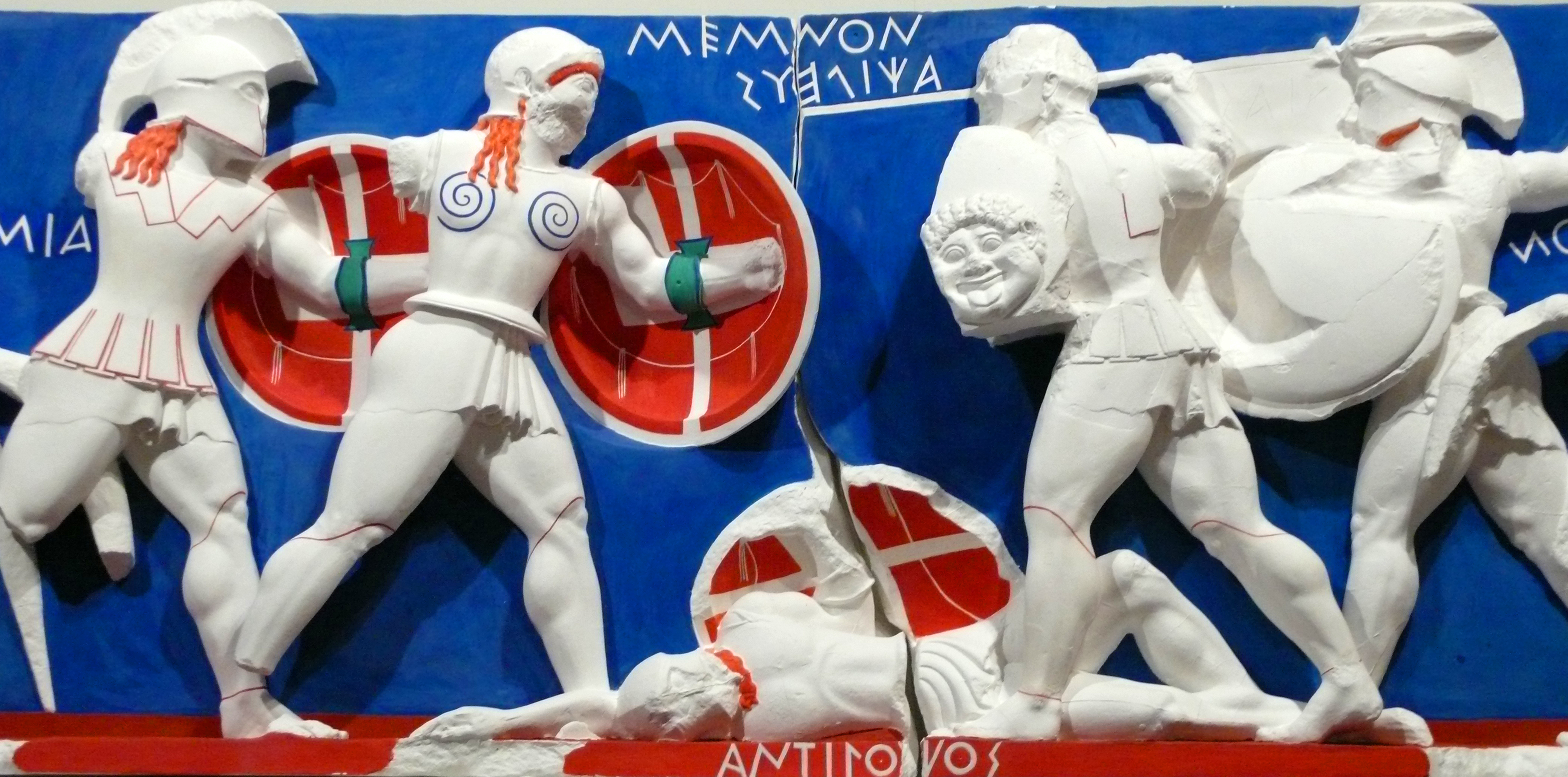 Detalle reconstruido en color del friso oriental del "Tesoro de los Sifnios". Aquiles entabla combate contra Memnón por la muerte de Antíloco. Exposición "El color de los dioses", Alcalá de Henares, 2010.